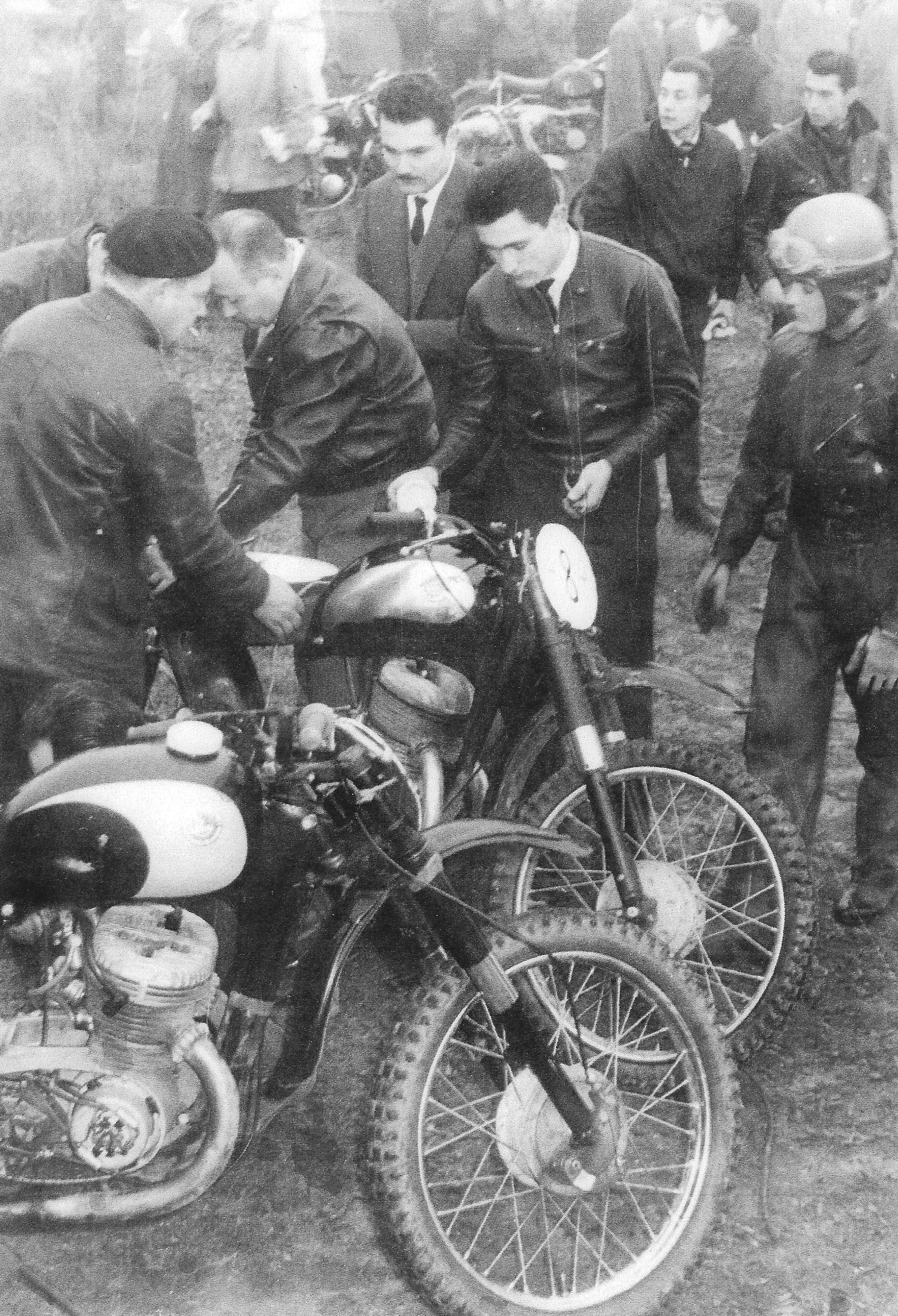 Pere Pi i Toni Palau al Motocross de la Casa de Campo de 1959